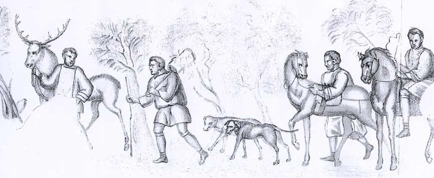 détail mosaique de lillebonne